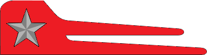 Mostrina della Fanteria Fuori Corpo del Regio Esercito italiano